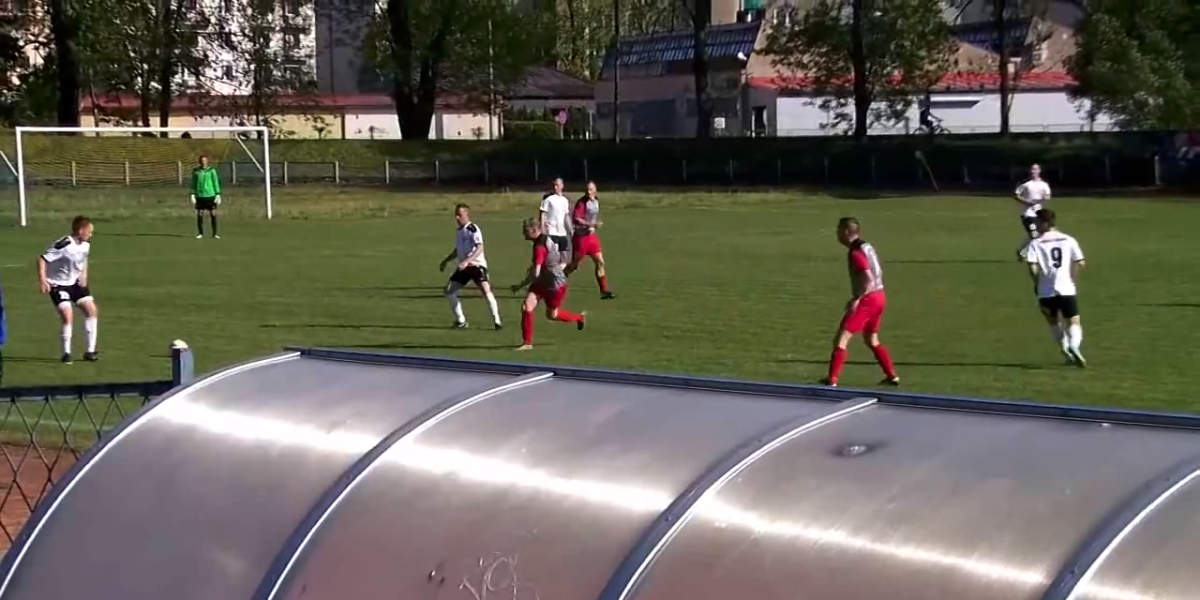 Mecz piłkarski Pogoni Prudnik z LZS Racławiczki rozegrany 5 maja 2018.